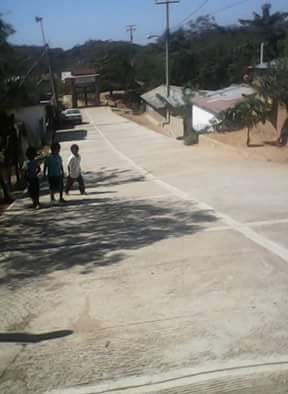 El Calle Vicente Guerrero en Centro en el Pueblo Amuzgo Tierra Colorada municipio Ometepec Guerrero México Bilingüe de la Región Zacoalpan Can'oom Nonmdaa Costa Chica de Guerrero y Oaxaca México